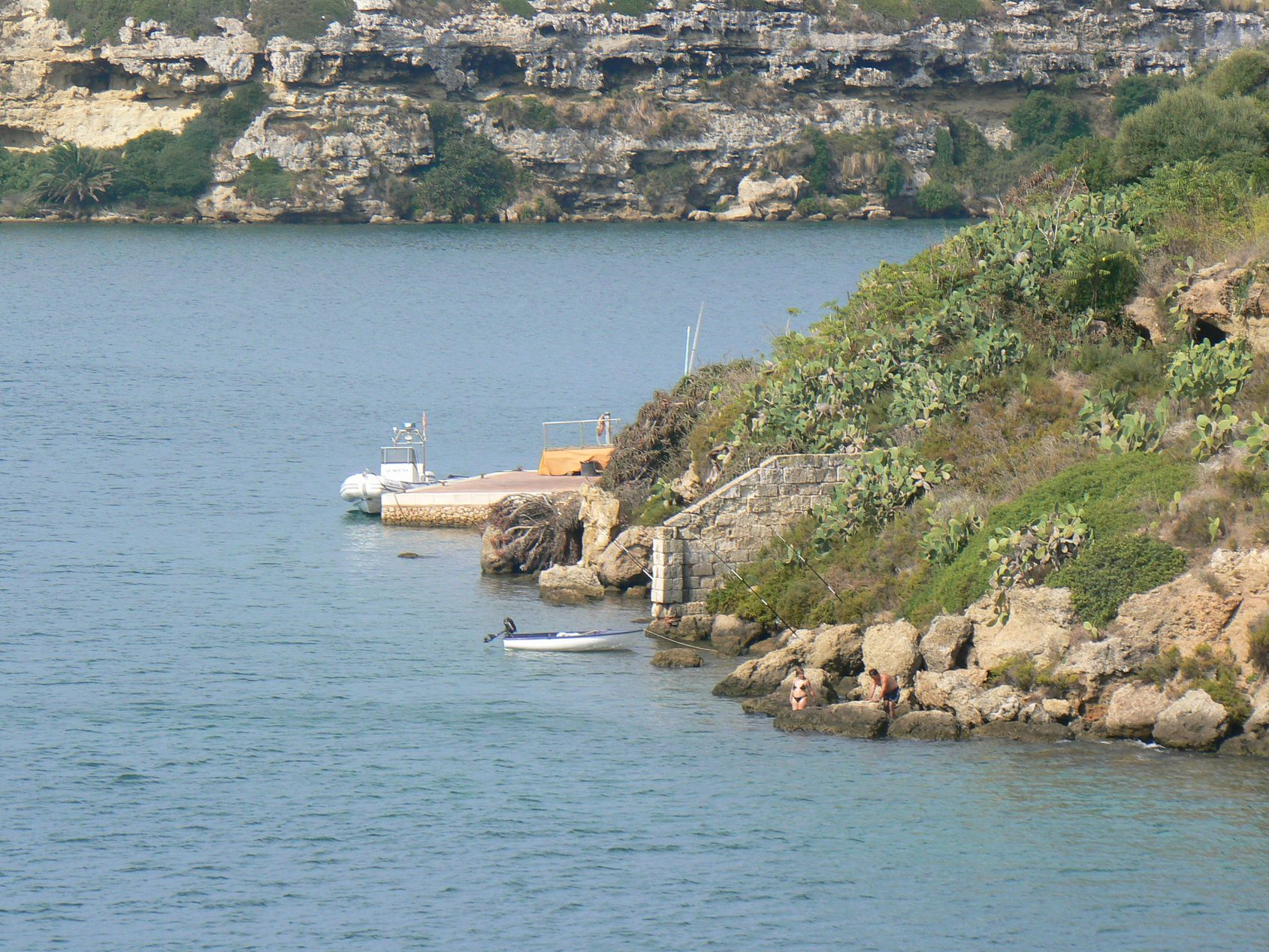 Embarcader petit de l'illa del Rei.